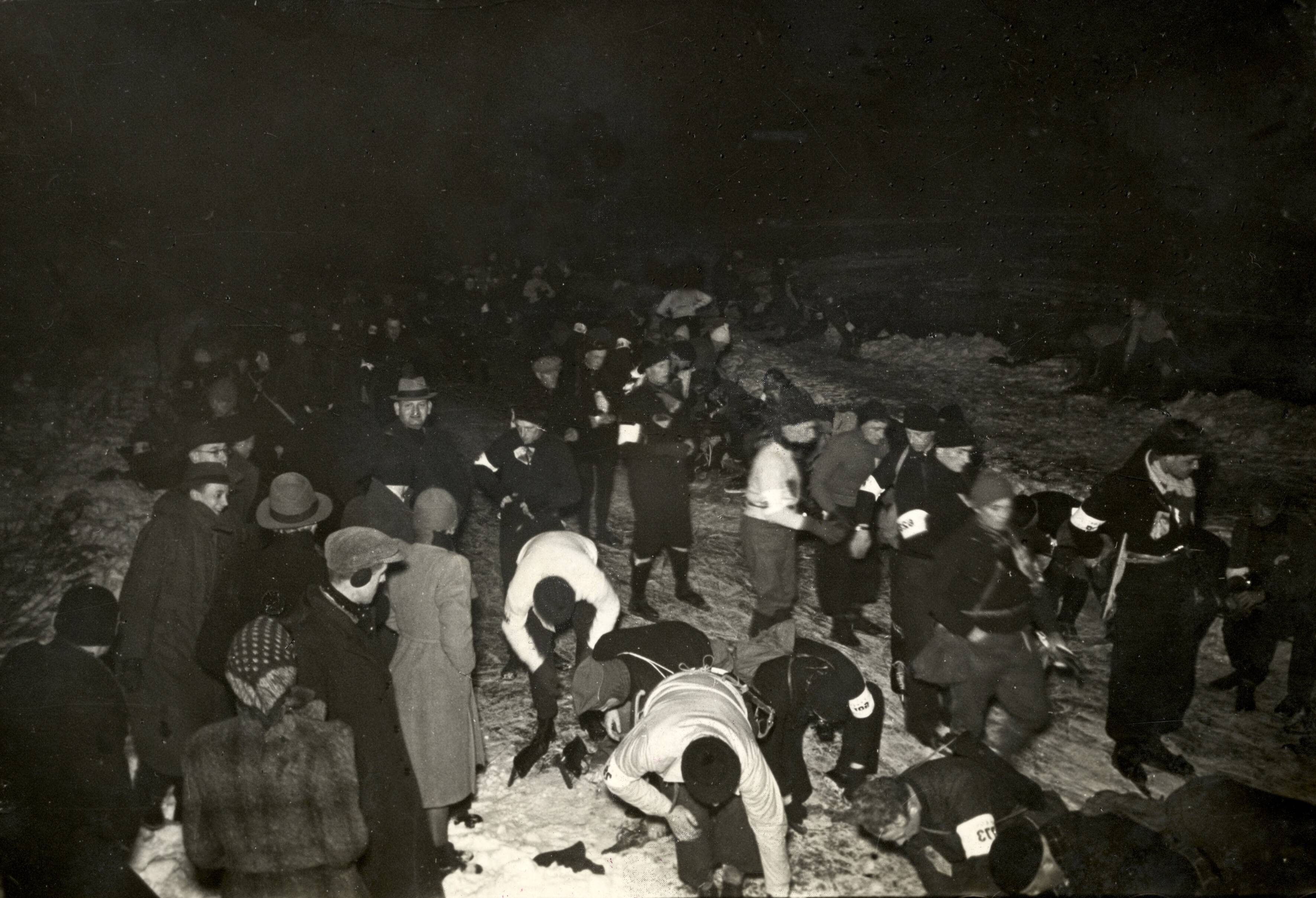 De start van de Elfstedentocht, 3000 deelnemers binden de schaatsen onder op het ijs, na de eigenlijke start vanuit de "Harmonie", de "Beurs" en de "Klandery", Leeuwarden, Leeuwarden, 30 januari 1940.